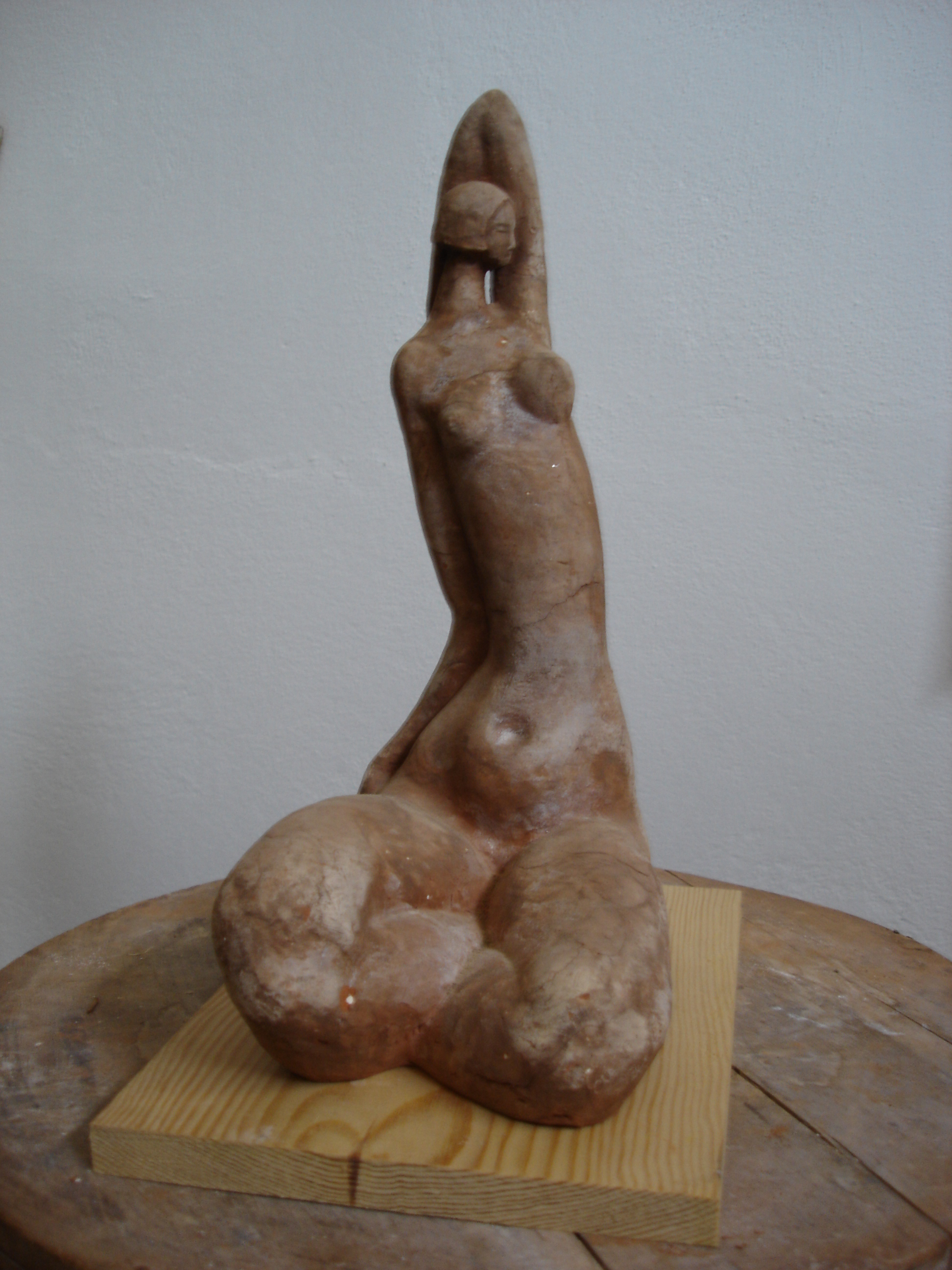 Escultura de terracota.